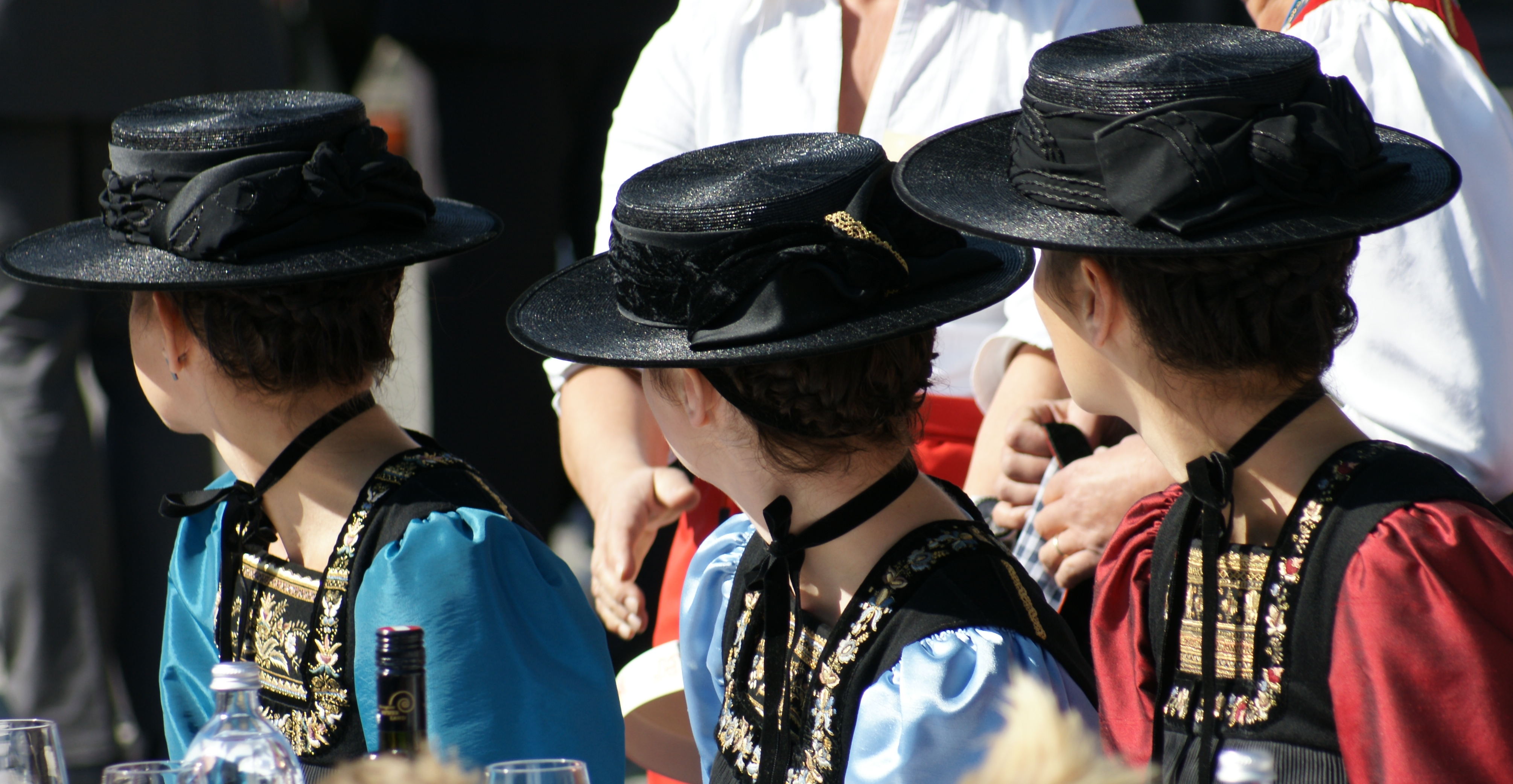 Die Merkmale der Bregenzerwälder Frauentracht (der Juppe) sind, die silberne Schnalle, der "Bleotz", welcher kunstvoll mit gold-silbernen Stickereinen versehen ist, der "Keadoro", ein kunstvoll goldsilberner bestickter Zierstreifen am Rücken und die verschiedenen Kopfbedeckungen. Sie sind ein ganz besonderes Markenzeichen der Wäldertracht. "Spitzkappe (für den Kirchgang)", "Brämokappo (Pezlkappe aus Seehundfell)", "Stuoz", "Stucho (weisses Haartuch für die Trauer)", "Schäohut (Strohhut, Sommer)", "Kauffmannhut (Filzhut, Übergangszeit)" und als Meisterstück das "Schappale (Trachtenkrönele, Krönchen oder Flitterkrone)". Gesehen an der größten Käsetafel der Welt, in Andelsbuch.